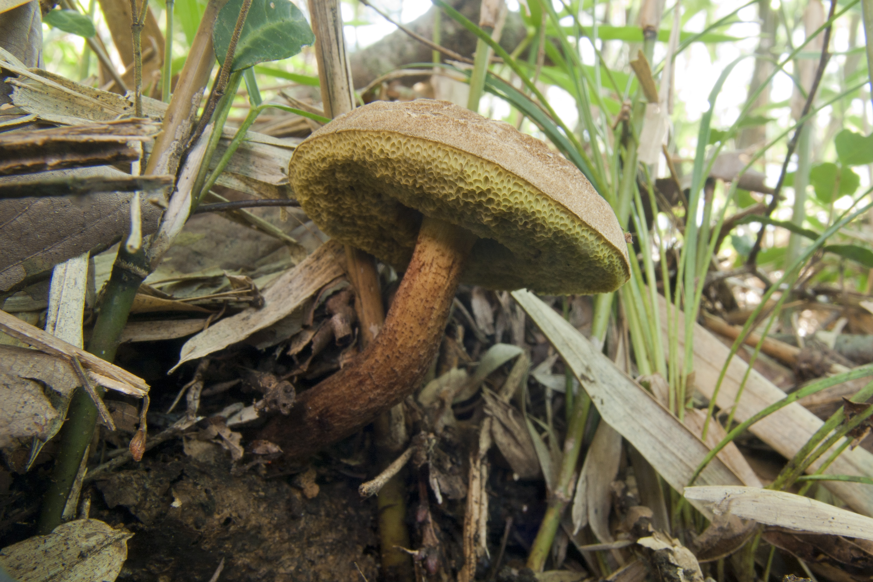 クロアザアワタケ (学名:Xerocomus nigromaculatus)